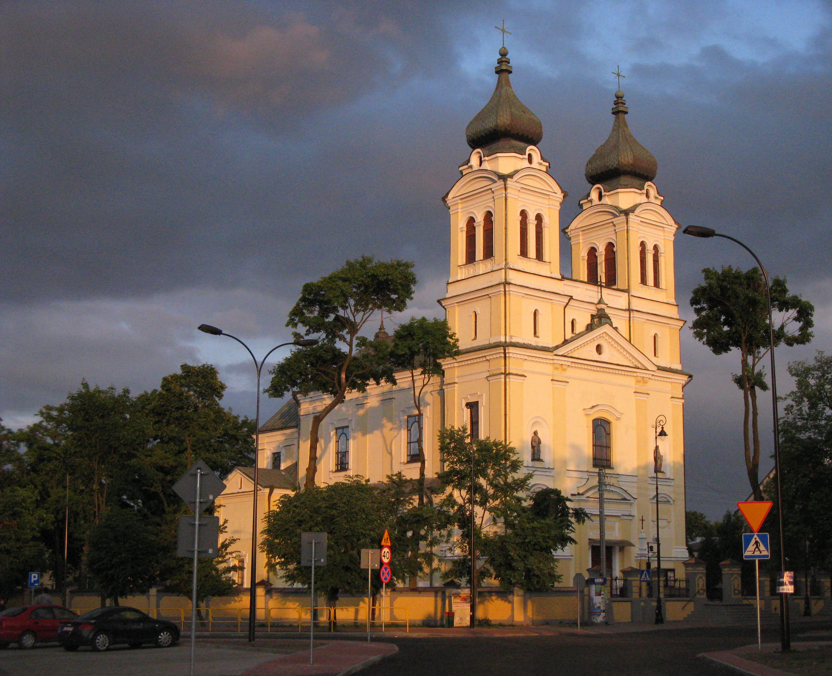 Kościół Wniebowzięcia Najświętszej Marii Panny w Biłgoraju